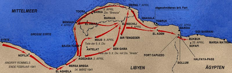 Vorstoß des Afrikakorps nach Ägypten bis zum 25. April 1941. Nofilia wurde vom Afrikakorps im Februar 1941 erreicht.